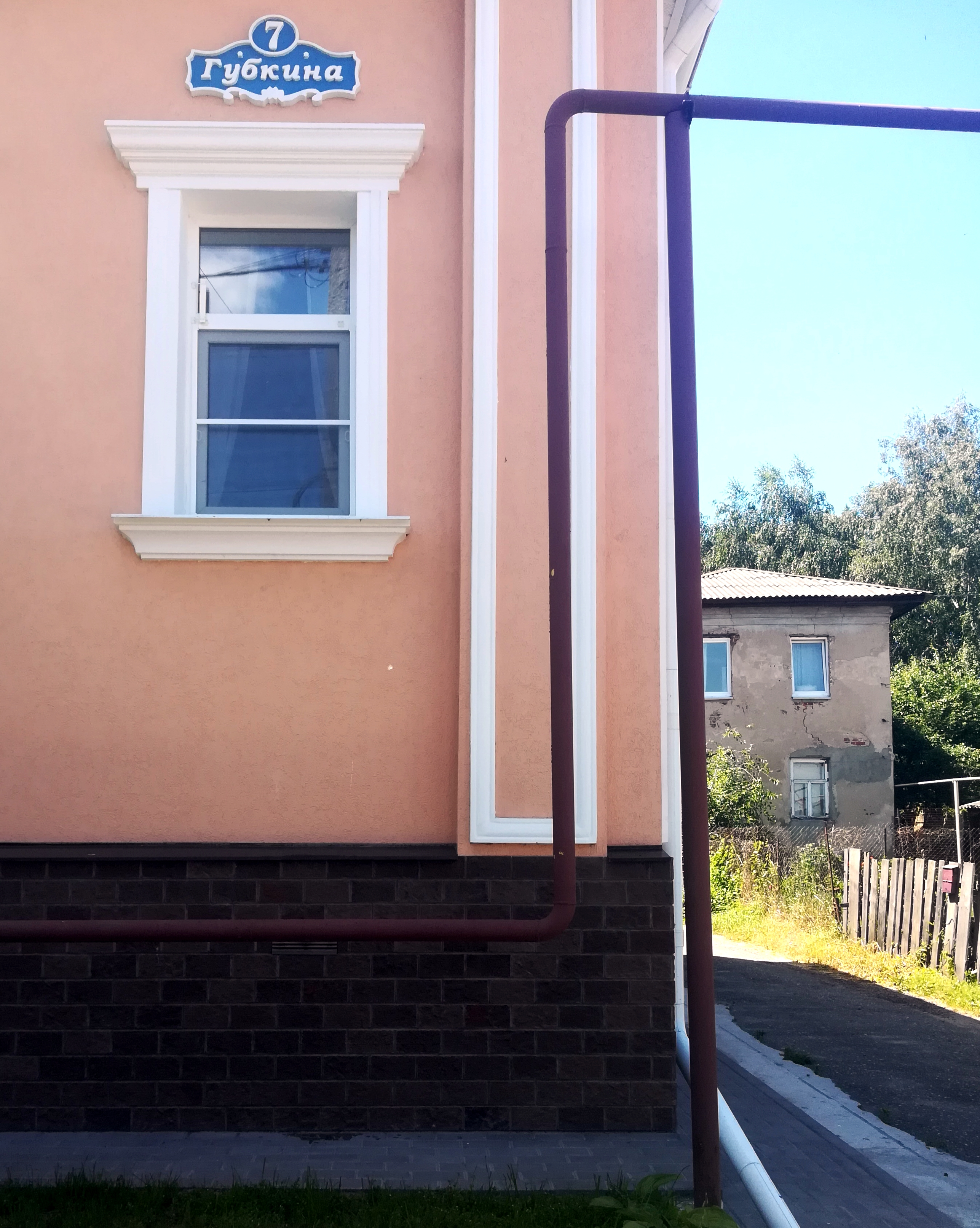 Муром